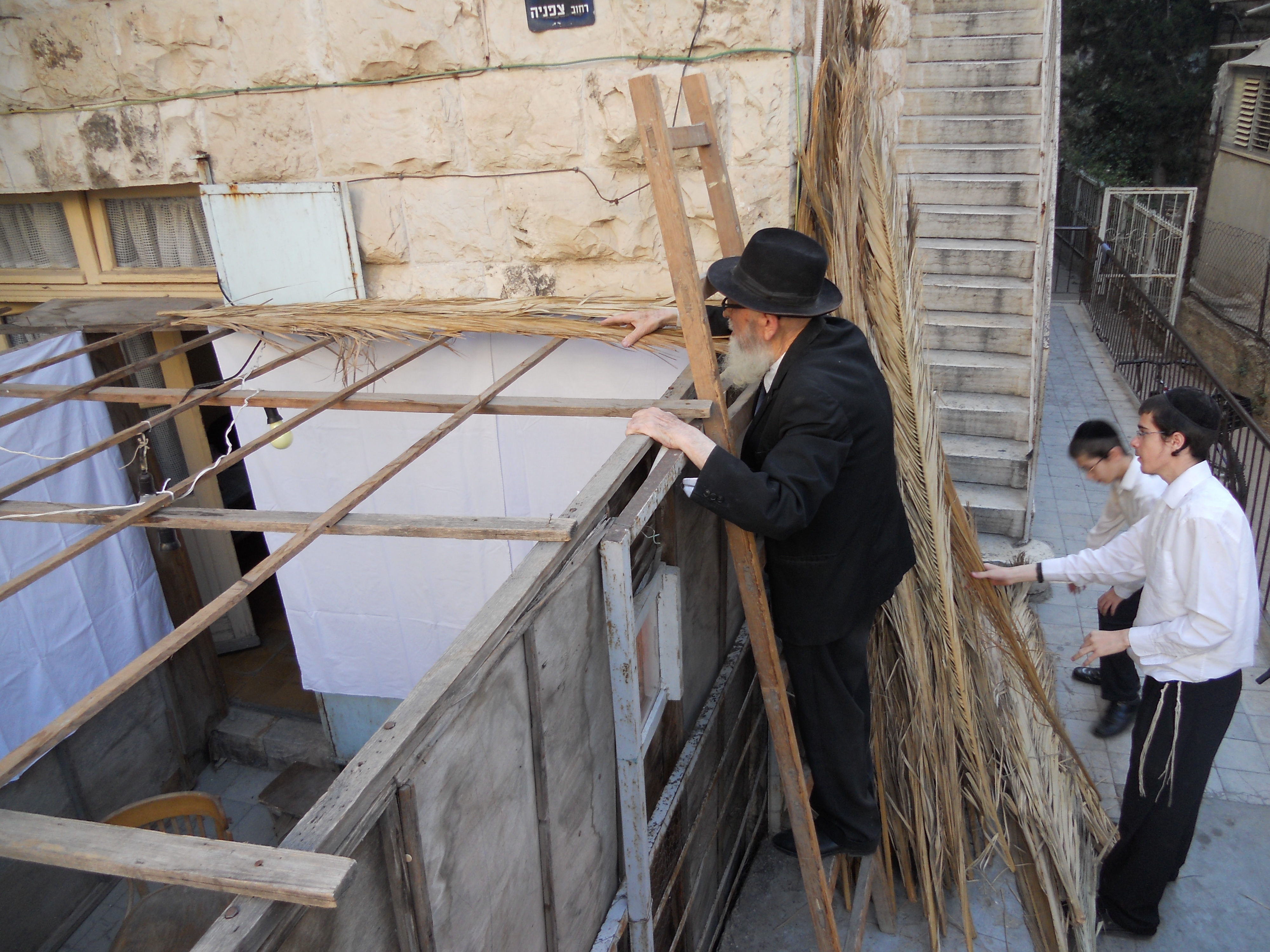 בניית סוכה בגאולה בירושלים, סוכות תשע"ב